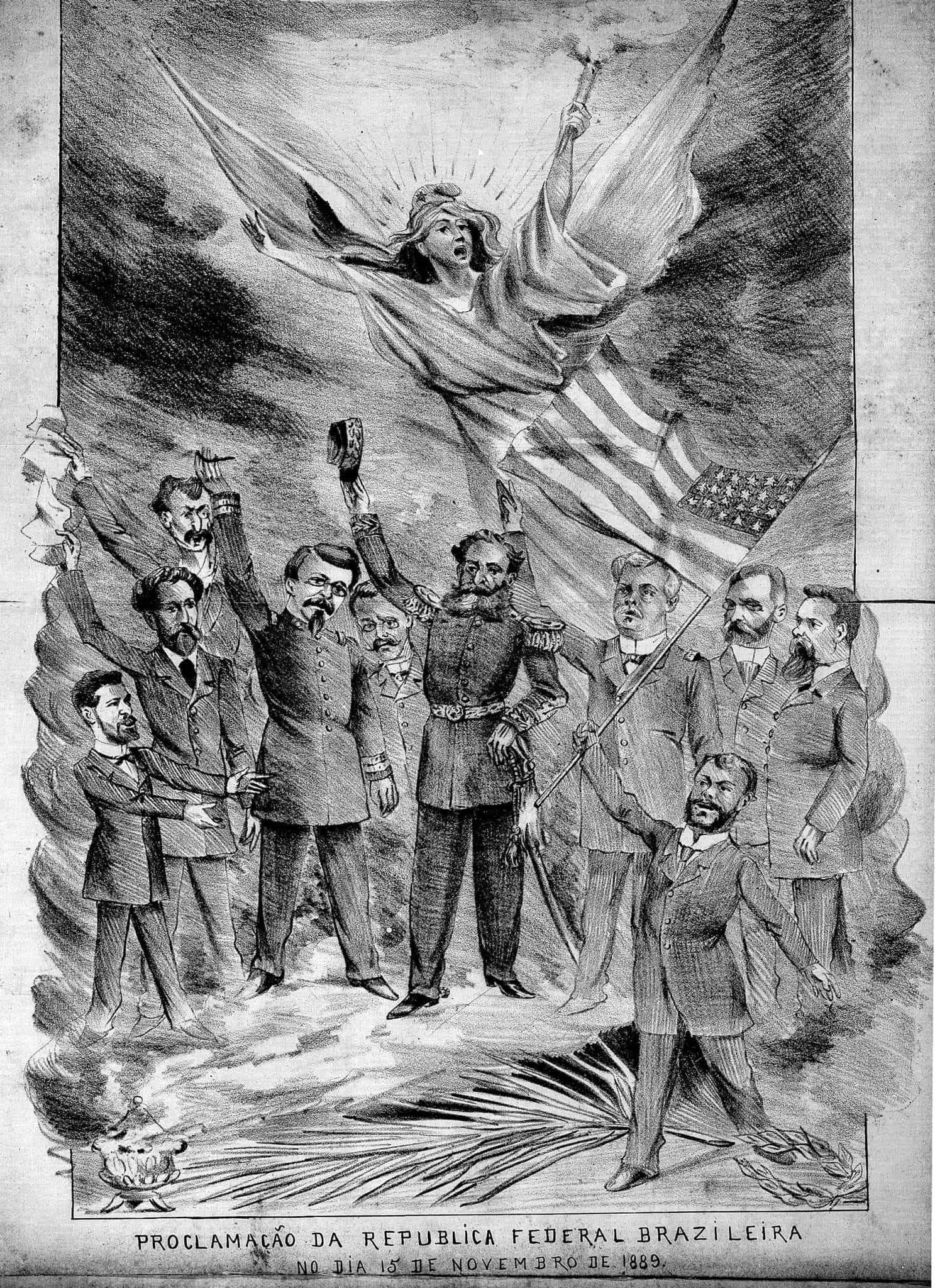 Ilustração sobre a proclamação da República do Brasil. Em primeiro plano, Lopes Trovão segurando proposta de pavilhão nacional.